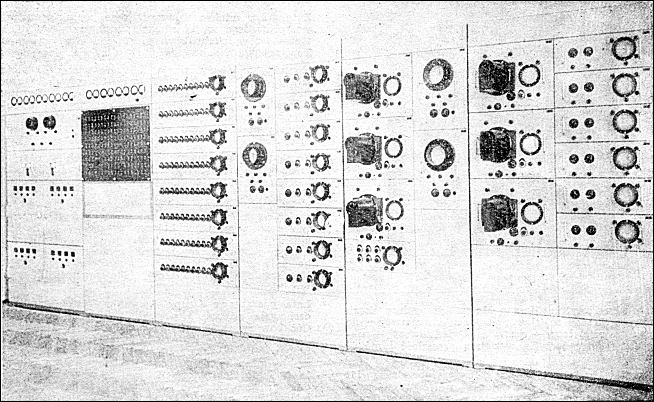 Analizator Równań Różniczkowych zbudowany w 1953